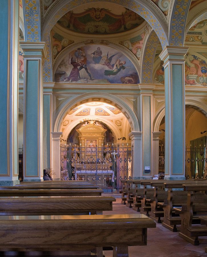 interno del santuario della Mdonna d'Erbia (Casnigo)